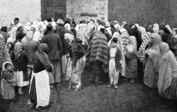 Gladna sirotinja koja je zaposela baštu italijanskog konzulata u Skadru, za vreme crnogorsko-srpske opsade (sredina januara 1913).